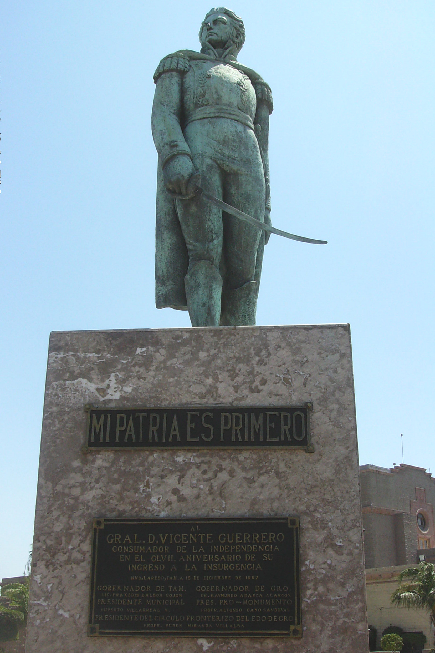 Vicente Guerrero Statue in Nuevo Laredo